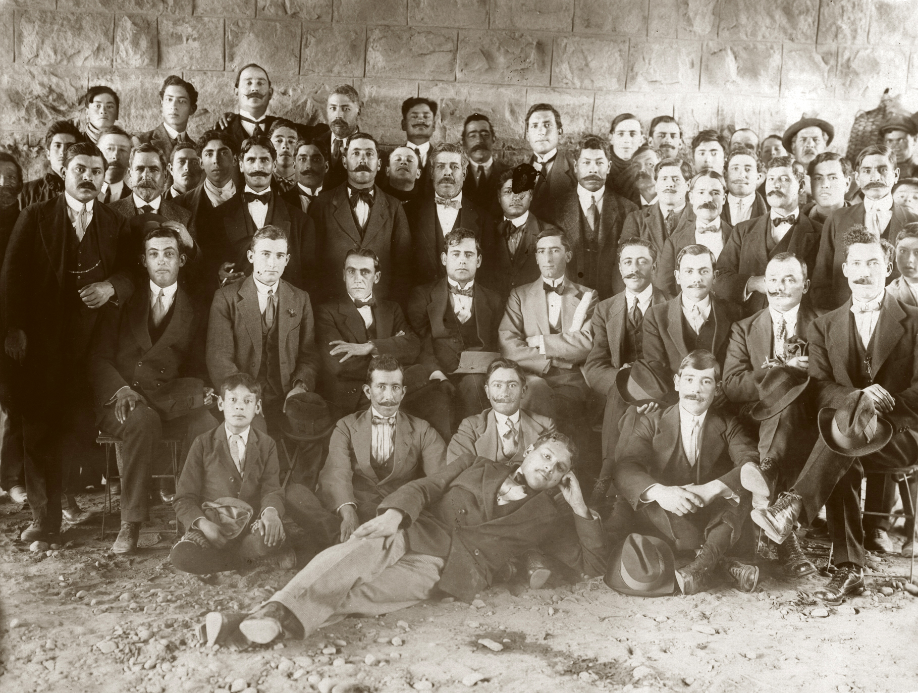 Fotografía grupal en blanco y negro, se observan muchas personas entre ellas Galileo Vitali.